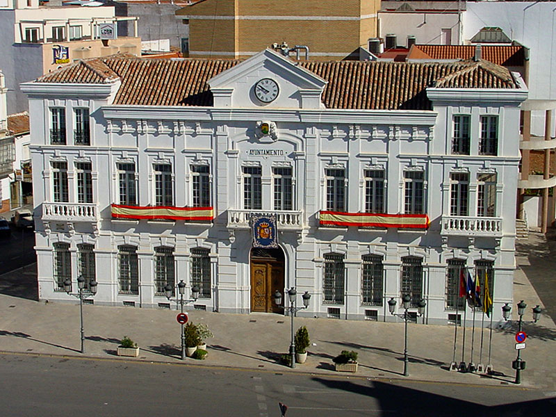 Ayuntamiento